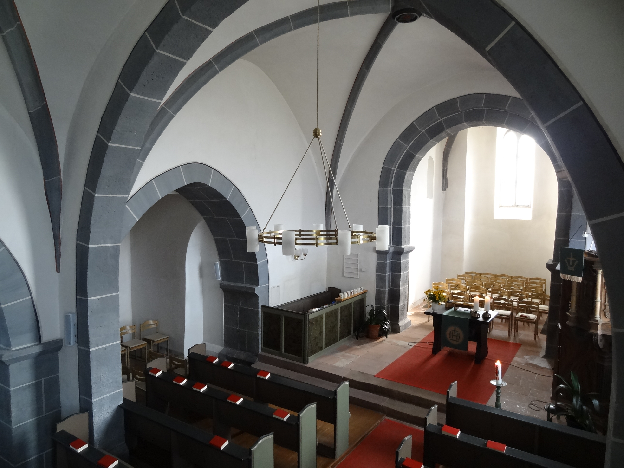 Evangelische Kirche Muschenheim